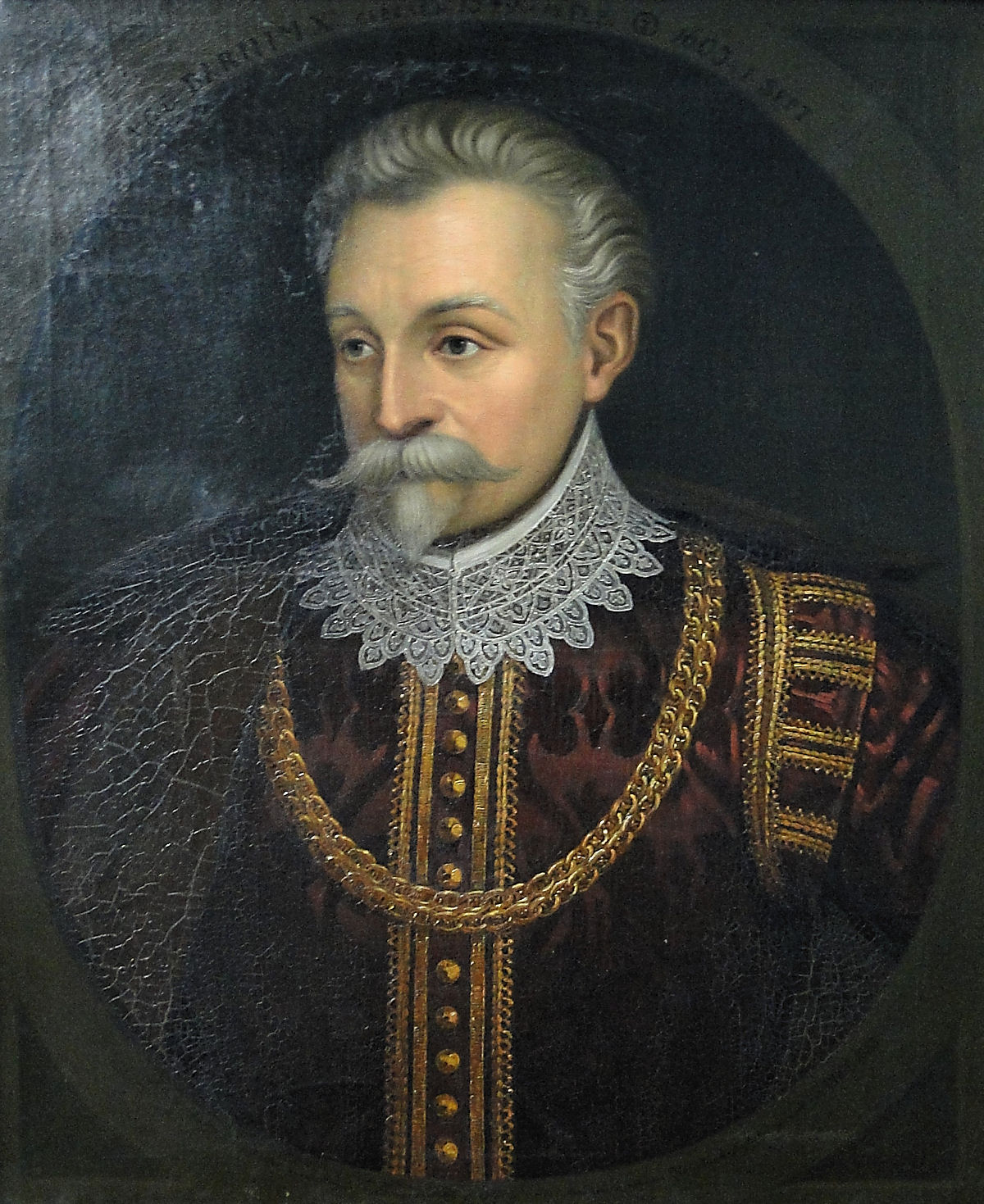 Obraz (Augusta) Ludwiga Mosta - obecnie w zbiorach Muzeum Narodowego w Szczecinie